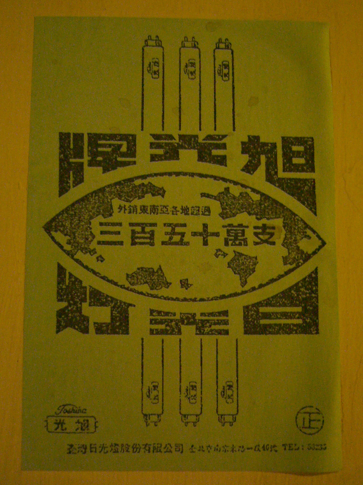 中文（台灣）: 台灣故事館內張貼的台灣日光燈「旭光牌日光燈」外銷廣告，年代不明，廣告標語是「旭光牌日光燈外銷東南亞各地超過三百五十萬支」。